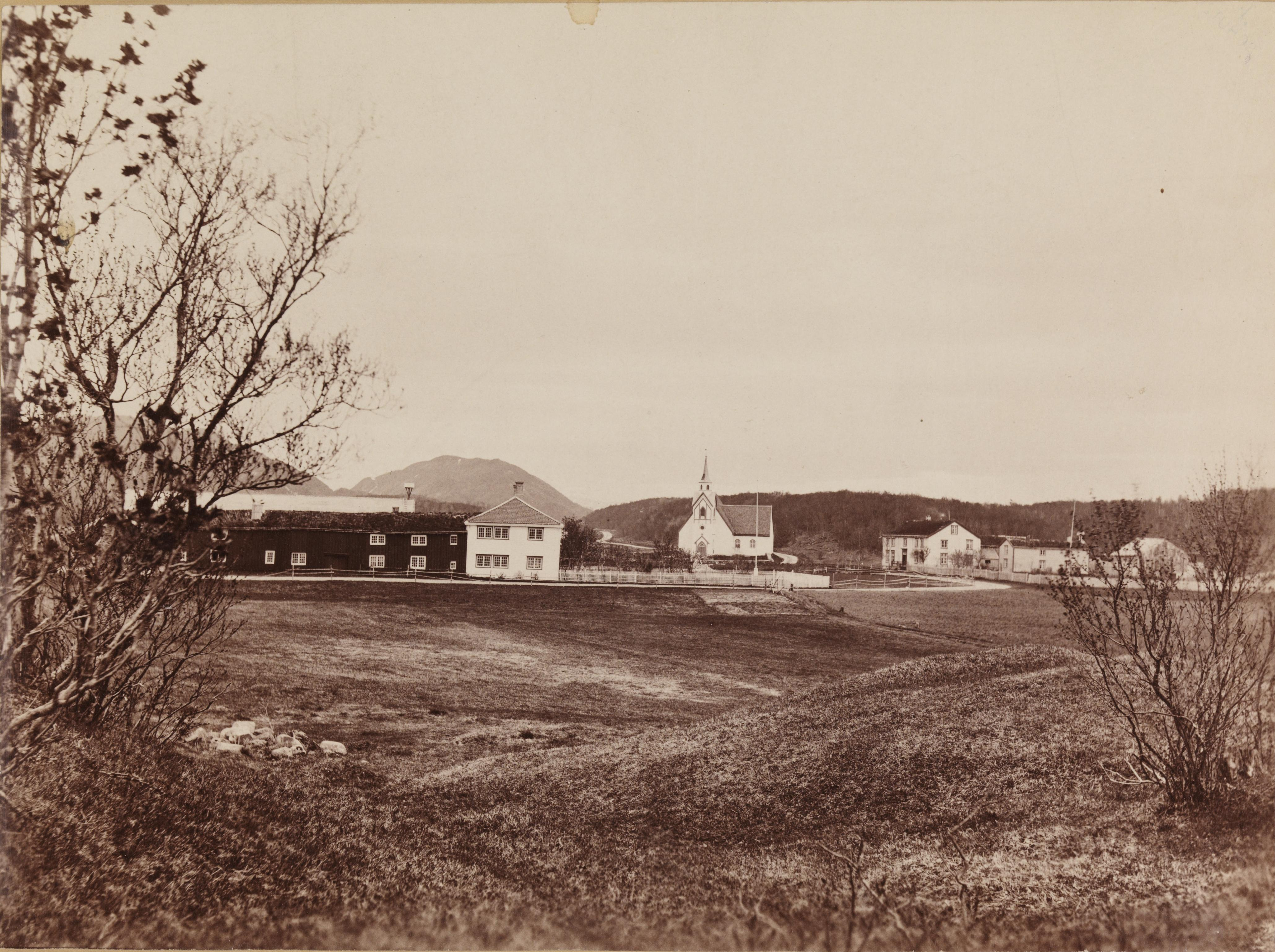 Bildet er hentet fra Nasjonalbibliotekets bildesamling. Anmerkninger til bildet var: Tittel hentet fra påskrift på komponentnr 1 Bodin, Bodø, Nordland